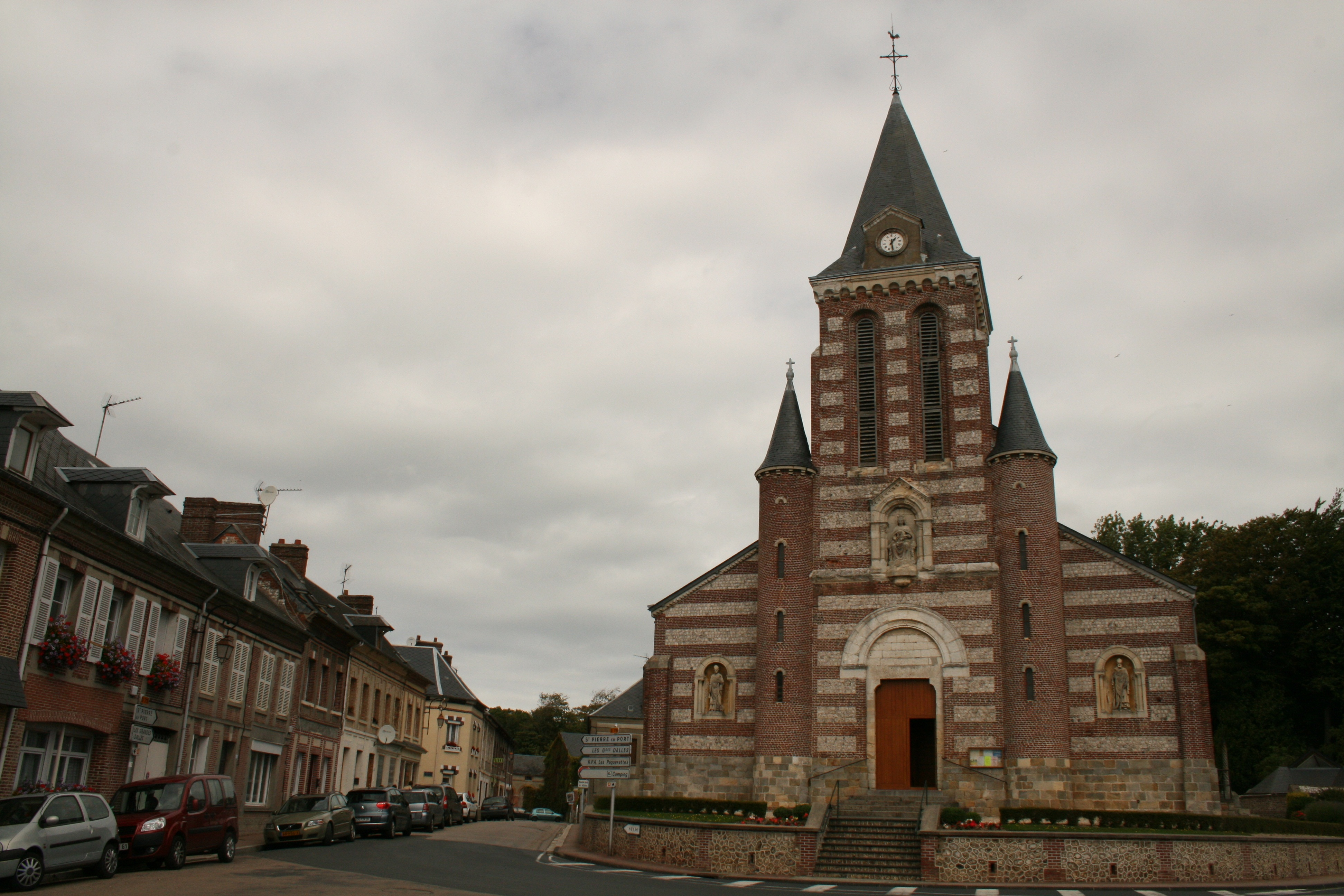 Sassetot le Mauconduit 2011 - Eglise 01